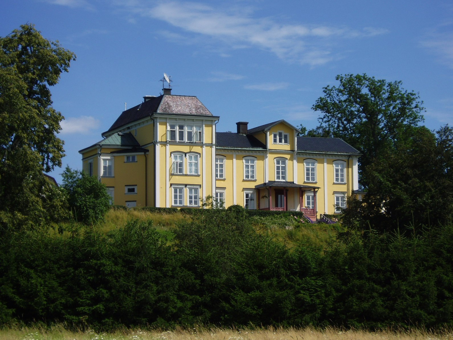 Lövsta gård, Enhörna, Södermanland